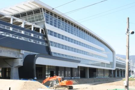 建設中の新鳥栖駅